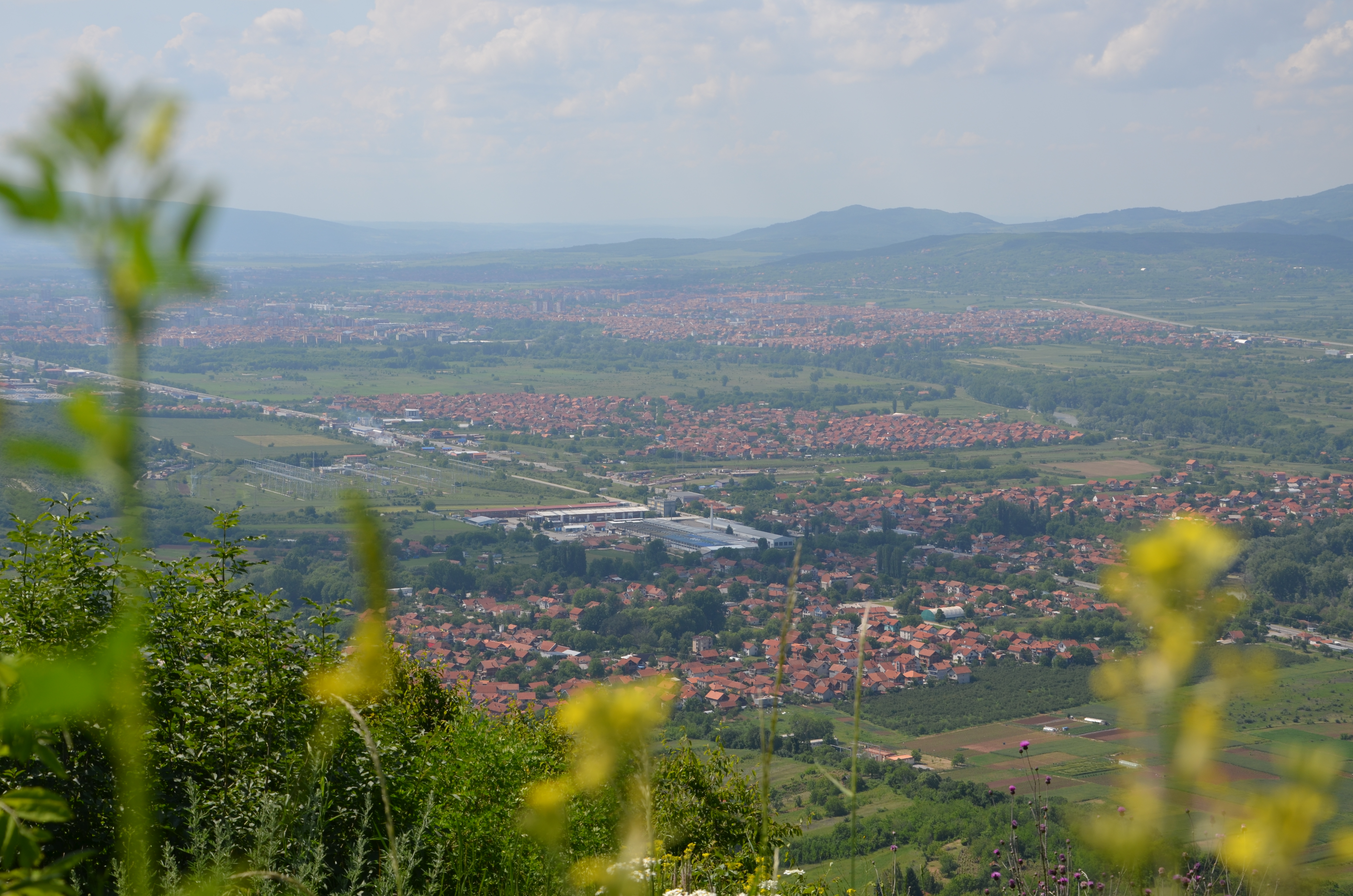 Srpski (latinica): Pogled sa brda iznad Niške banje na deo grada Niša i gradsku opštinu Niška banja.